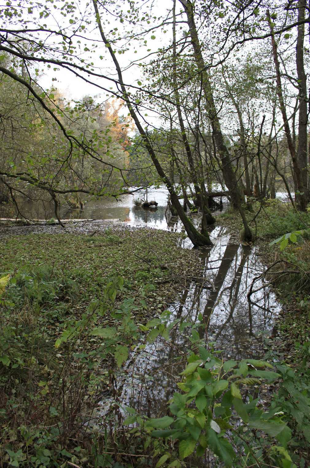 Přírodní památka Cukl a Rozsečské rašeliniště, Rozseč nad Kunštátem, okres Blansko, Jihomoravský kraj, přítok Rozsečského potoka do rybníku Cukl